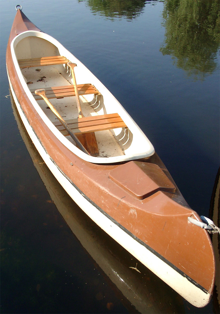 Ein Kanu. GNU-FDL, selbst fotografiert